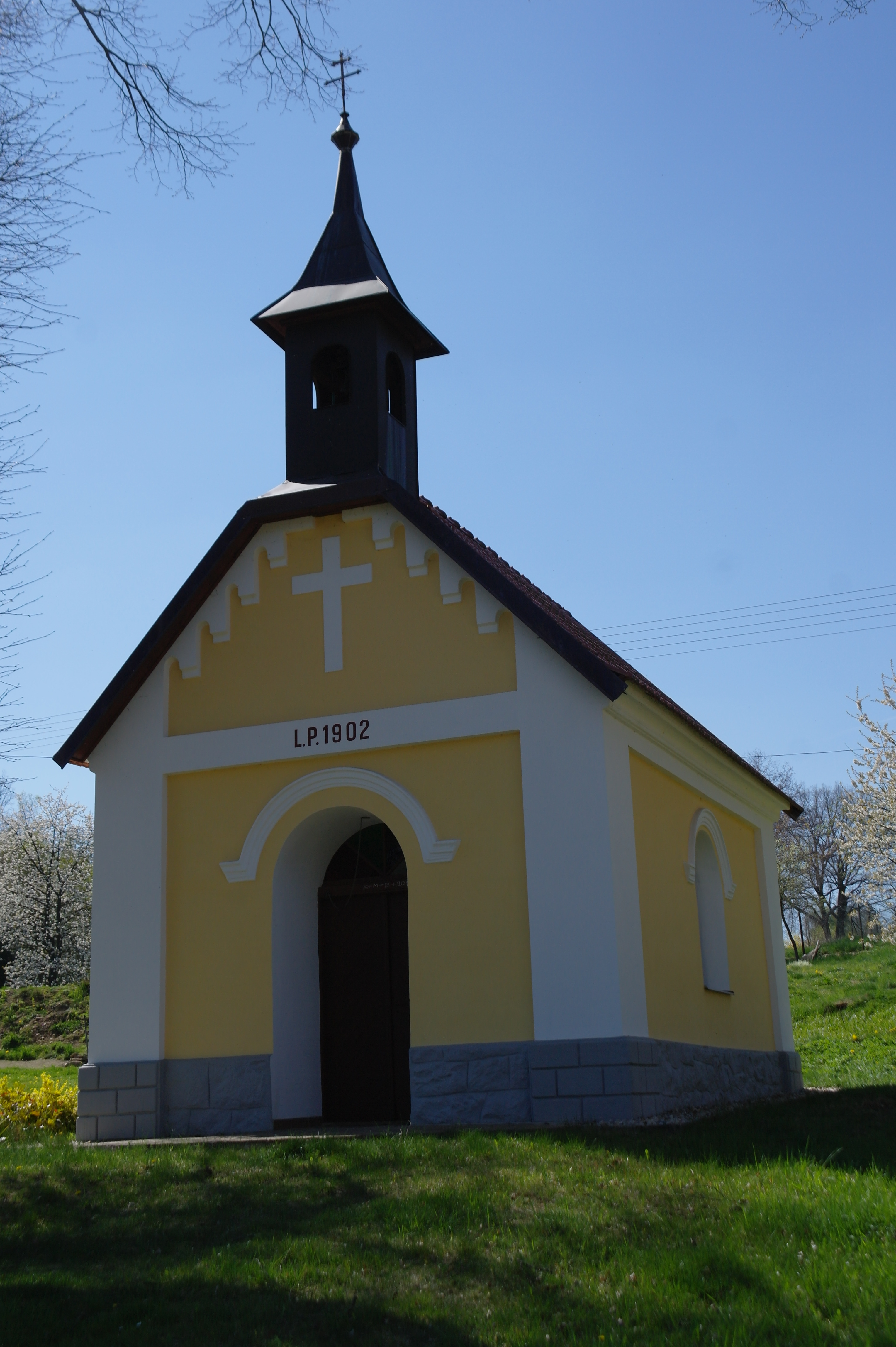 Sedlečko (Veliš). Česká republika.